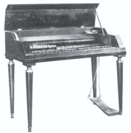 Clavicilindro, instrumento musical de fricção